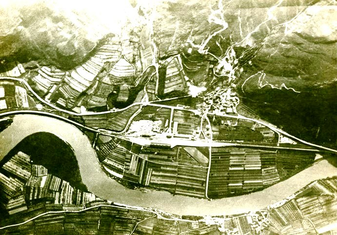 Самолетна снимка на селището Басано, Италия, в момент на хвърляне на бомби от австро-унгарски летец.